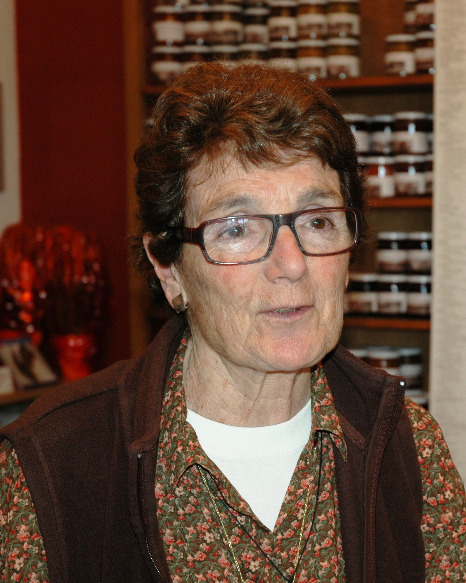 Georgina Regàs al Museu de la Confitura de Torrent